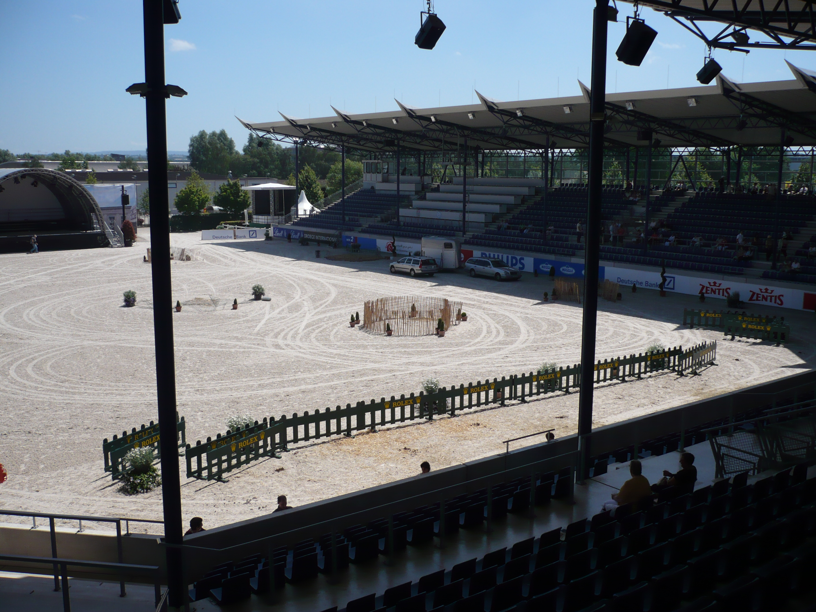 Reitstadion (Aachen), Dressurstadion